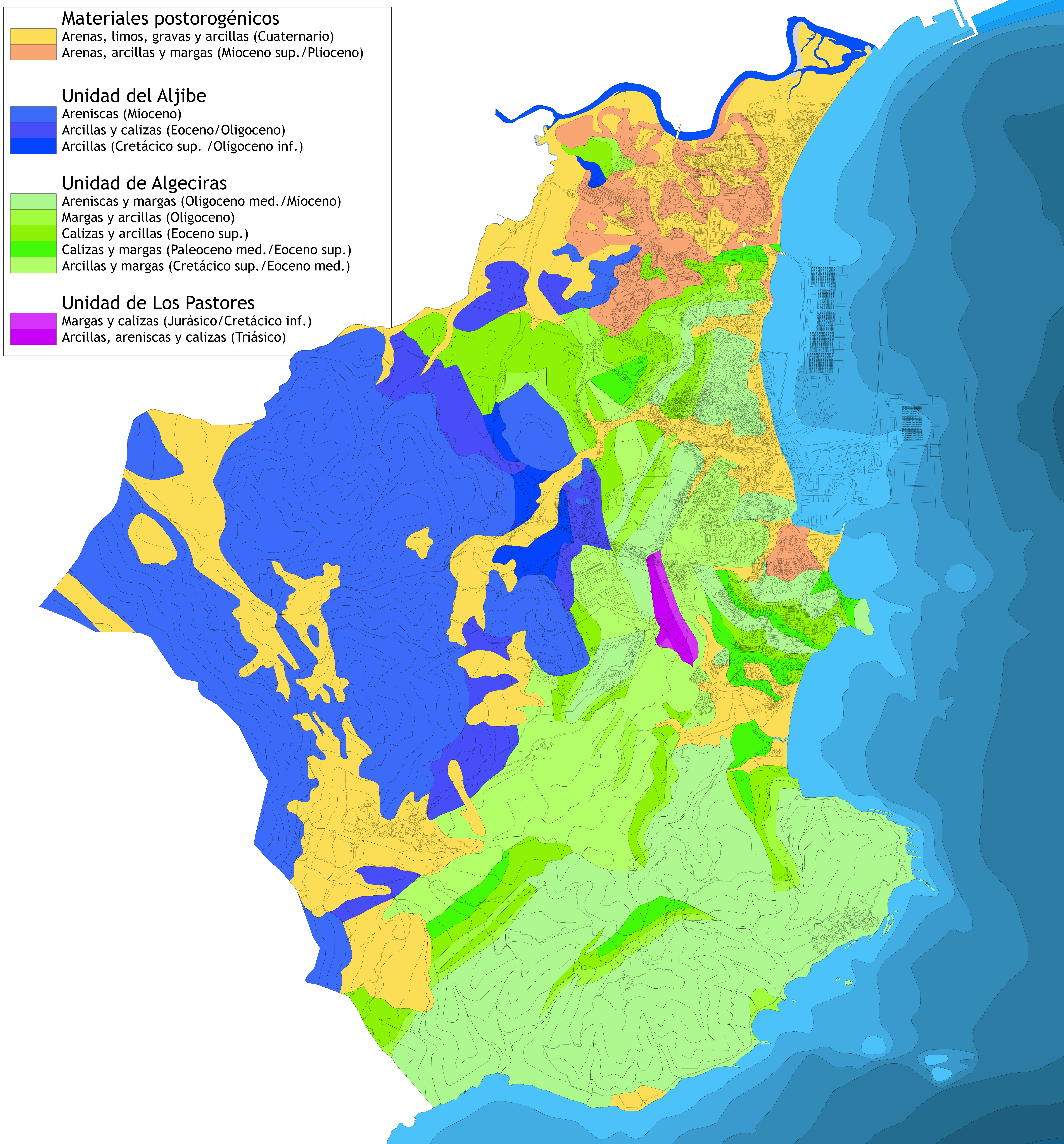 Mapa del término municipal de Algeciras indicando su geología. Algeciras, Andalucía, España.